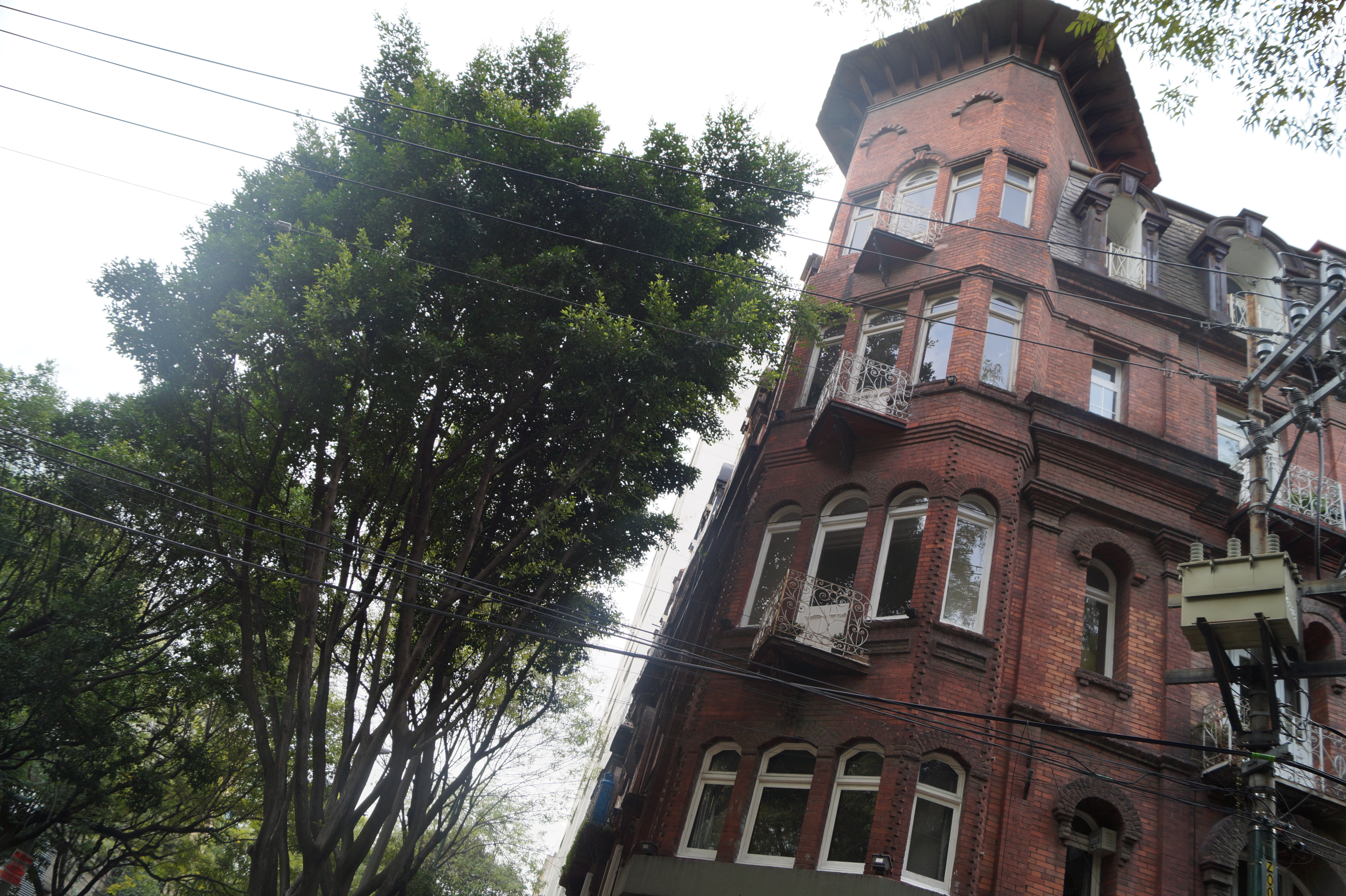 Edificio Río de Janeiro en un costado de la calle Orizaba de la colonia Roma Norte de la Ciudad de México.